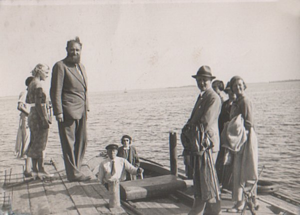 Peter Freuchen med gæster på øen Enehøje i Nakskov Fjord. Det er Peter Freuchen med fuldskægget.